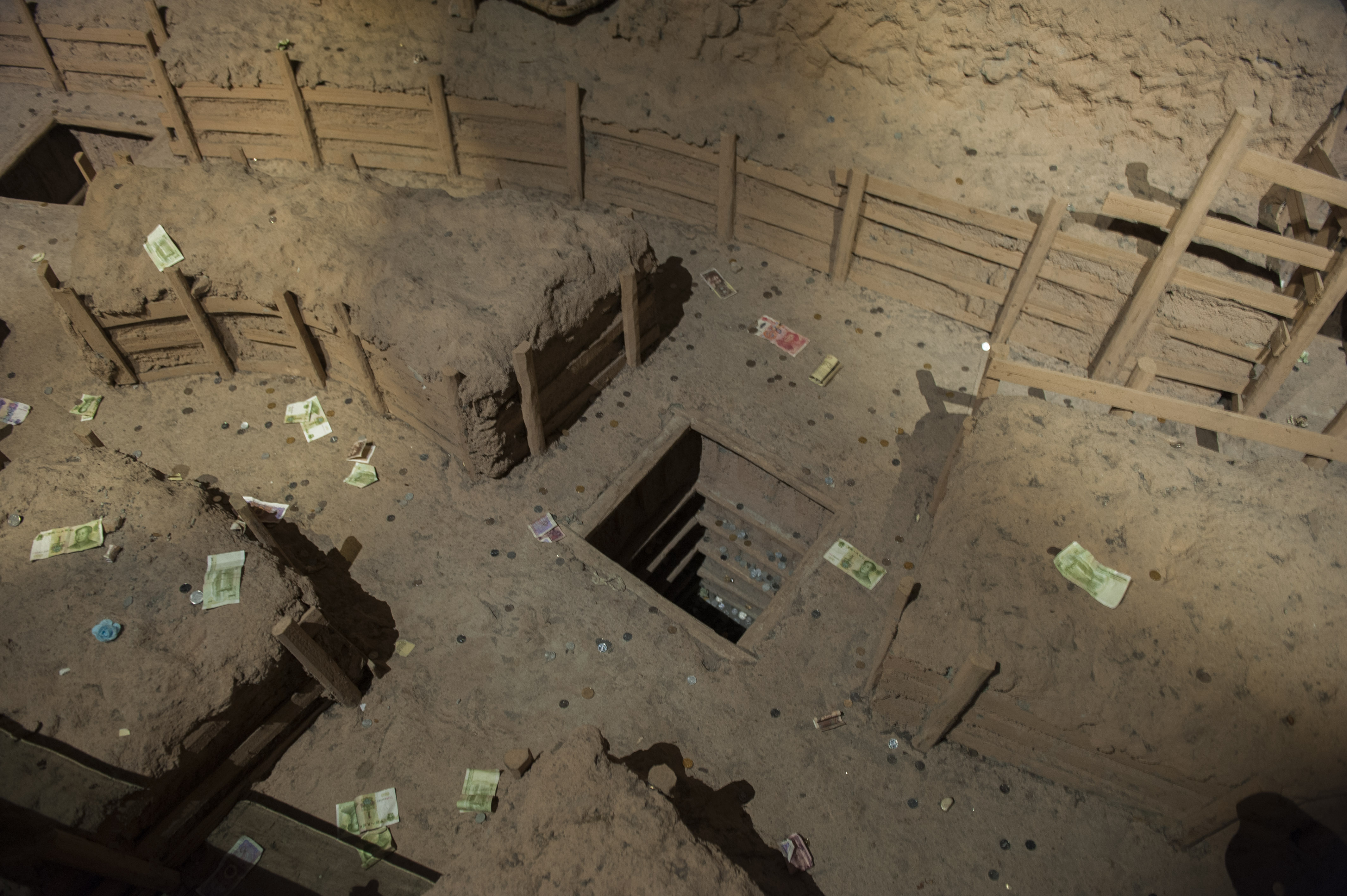 湖北省博物馆展出的大冶铜绿山模型上被撒许愿钱